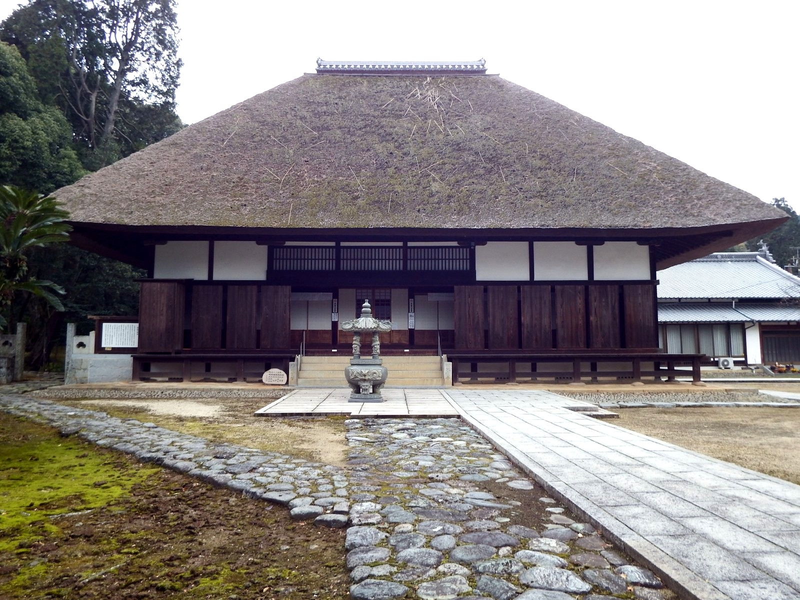 保国寺の本堂